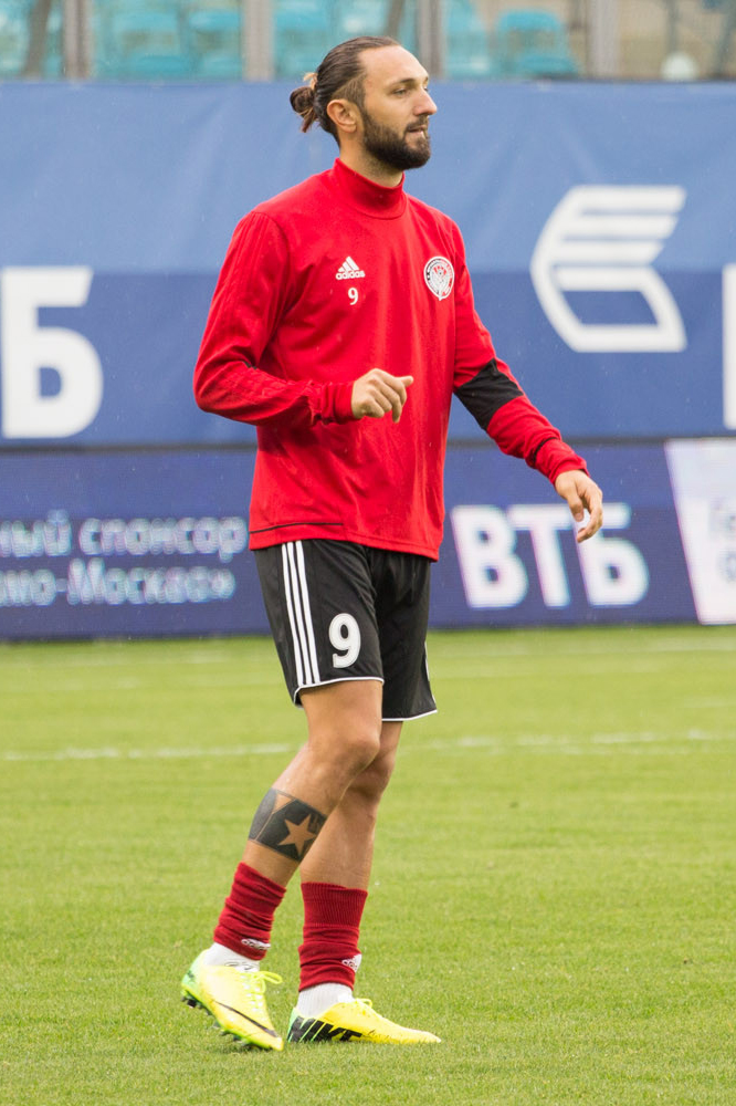 «Динамо» - «Амкар»